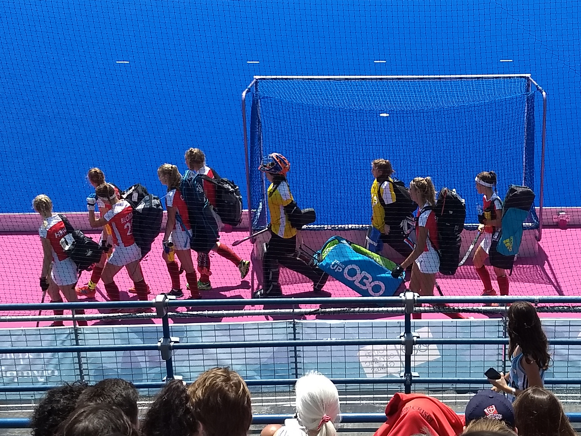 Ingreso de las jugadoras austríacas al campo de juego.